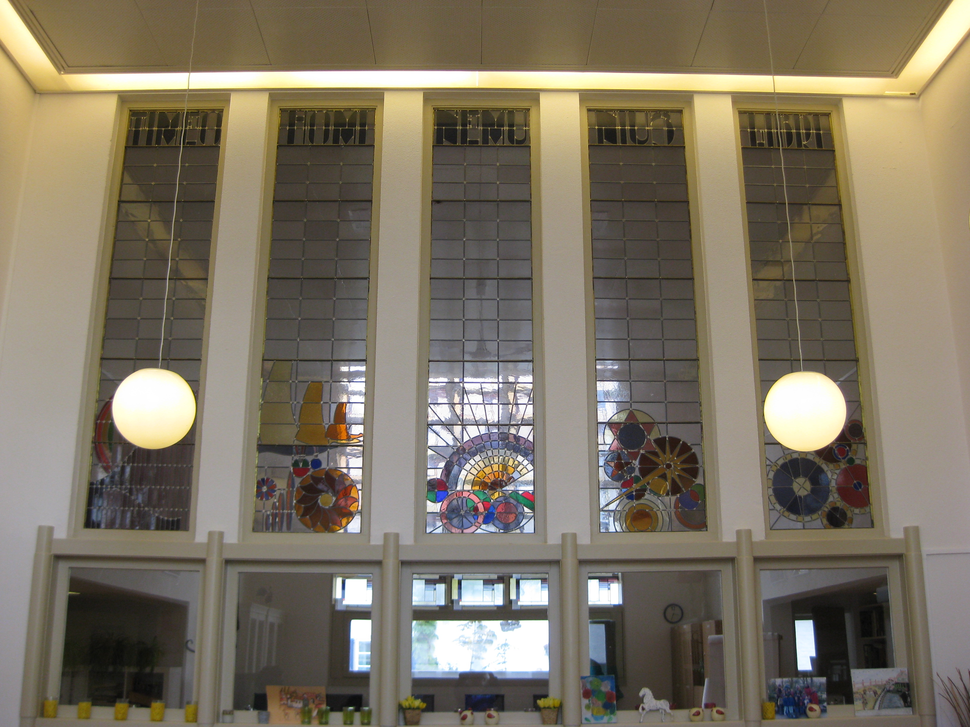 Architect Dick Greiner ontwierp niet alleen het gebouw, ook het hele interieur, zoals de deuren, ramen, kozijnen en letters van bibliotheekgebouw, Brink 43, Amsterdam-Oost. Bovenin staat geschreven: Timeo hominem unius libri (in het debat vrees ik de man die slechts één boek heeft gelezen) Thomas van Aquino.